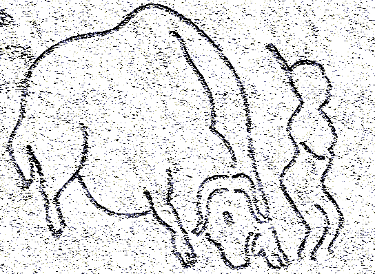 Relieve paleolítico de la cueva de Roc de Sers (Charente, Francia)